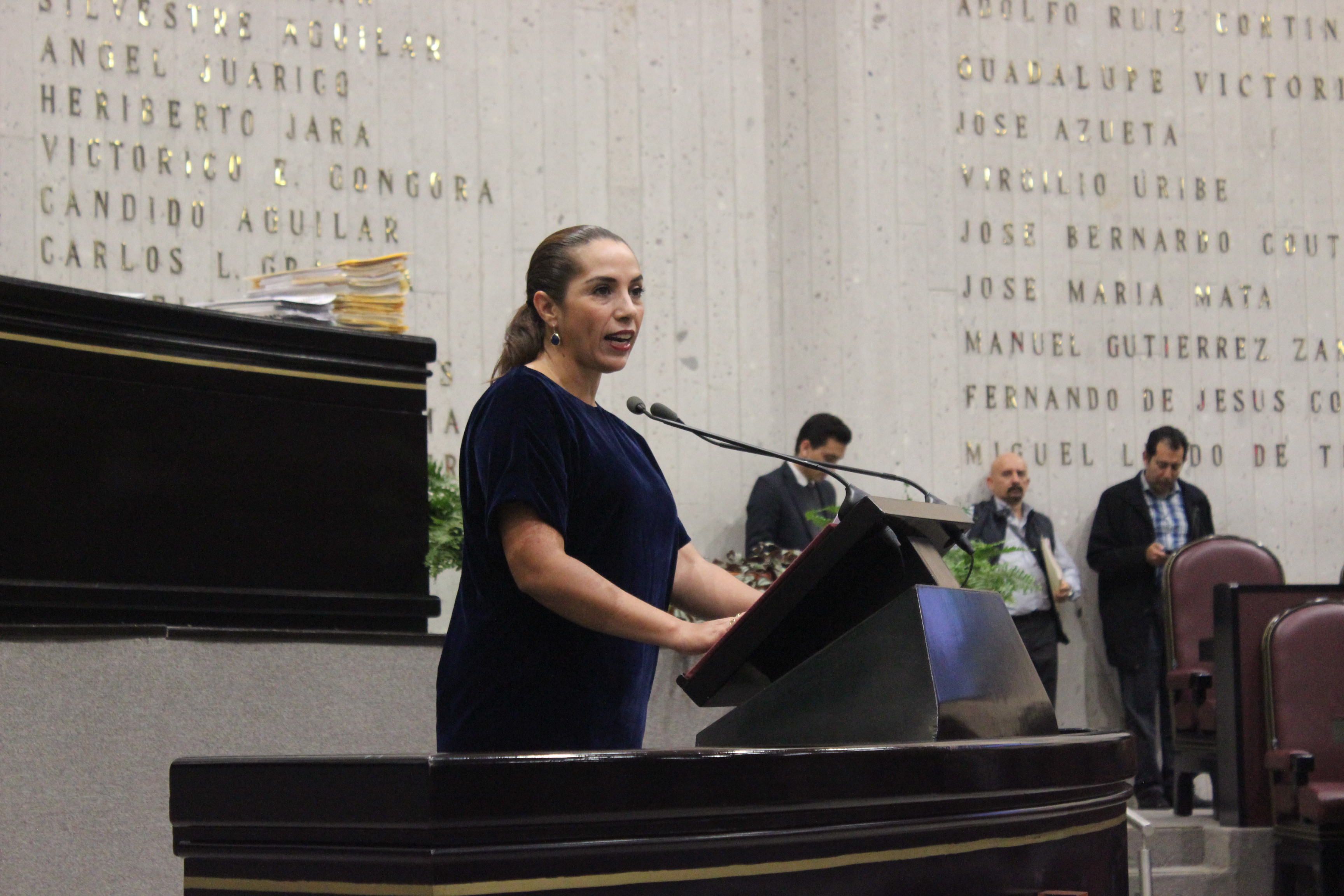 Lobato Calderón anunciando modificación a la ley orgánica estatal de Veracruz